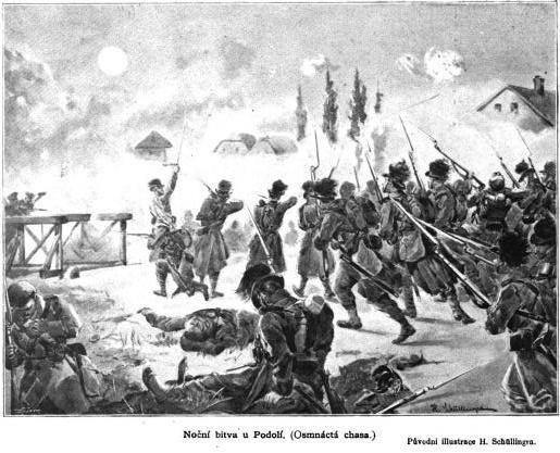 Night battle outside Podolí (near Mnichovo Hradiště) during early days of Austro-Prussian War. An illustration to book Válka z roku 1866 v Čechách, její vznik, děje a následky (1866 War in Bohemia - its origins, events and consequences) by Servác Heller (1845 - 1922)